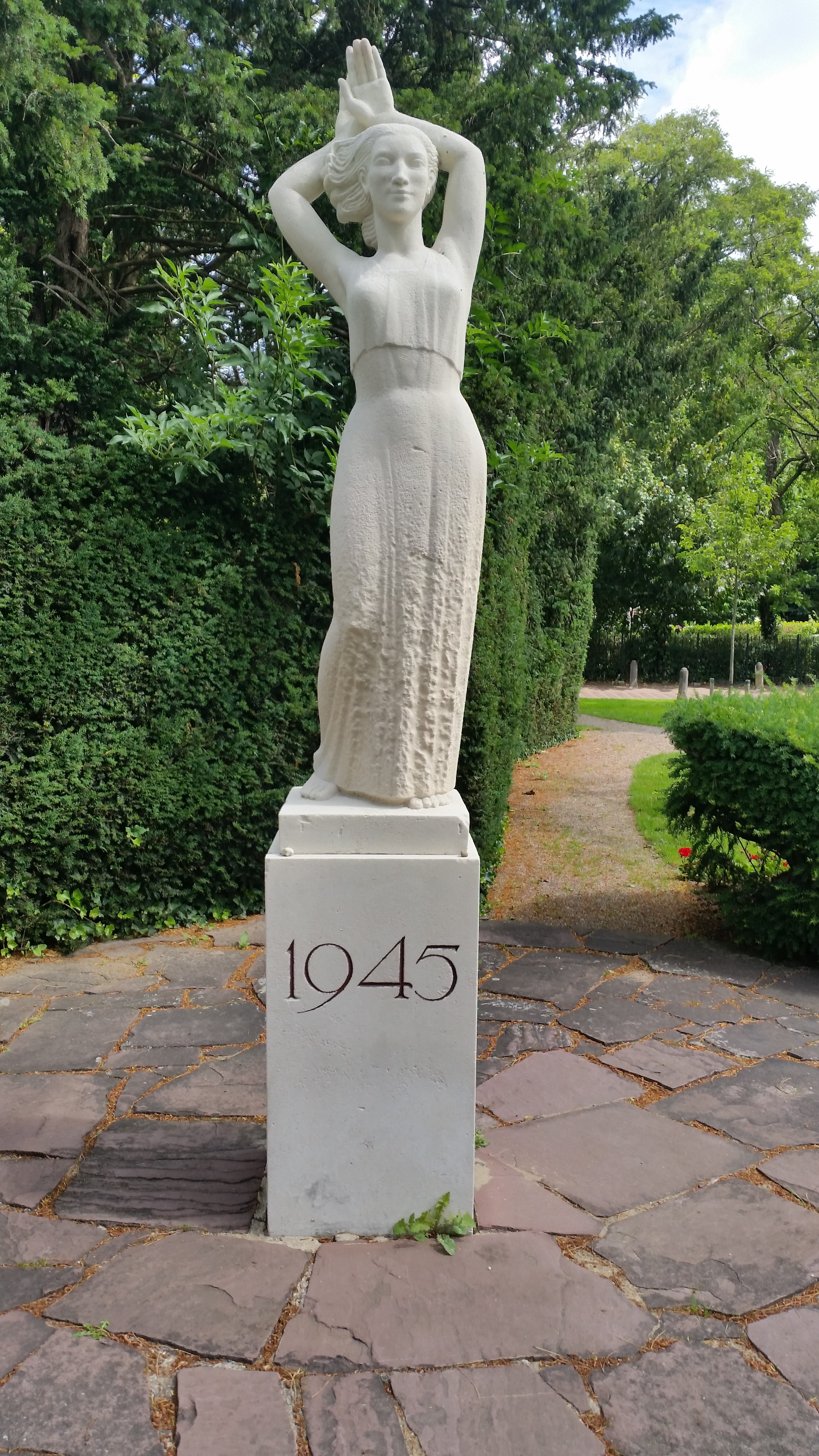 Impressie Bevrijdingsmonument Bloemendaal (juli 2020)